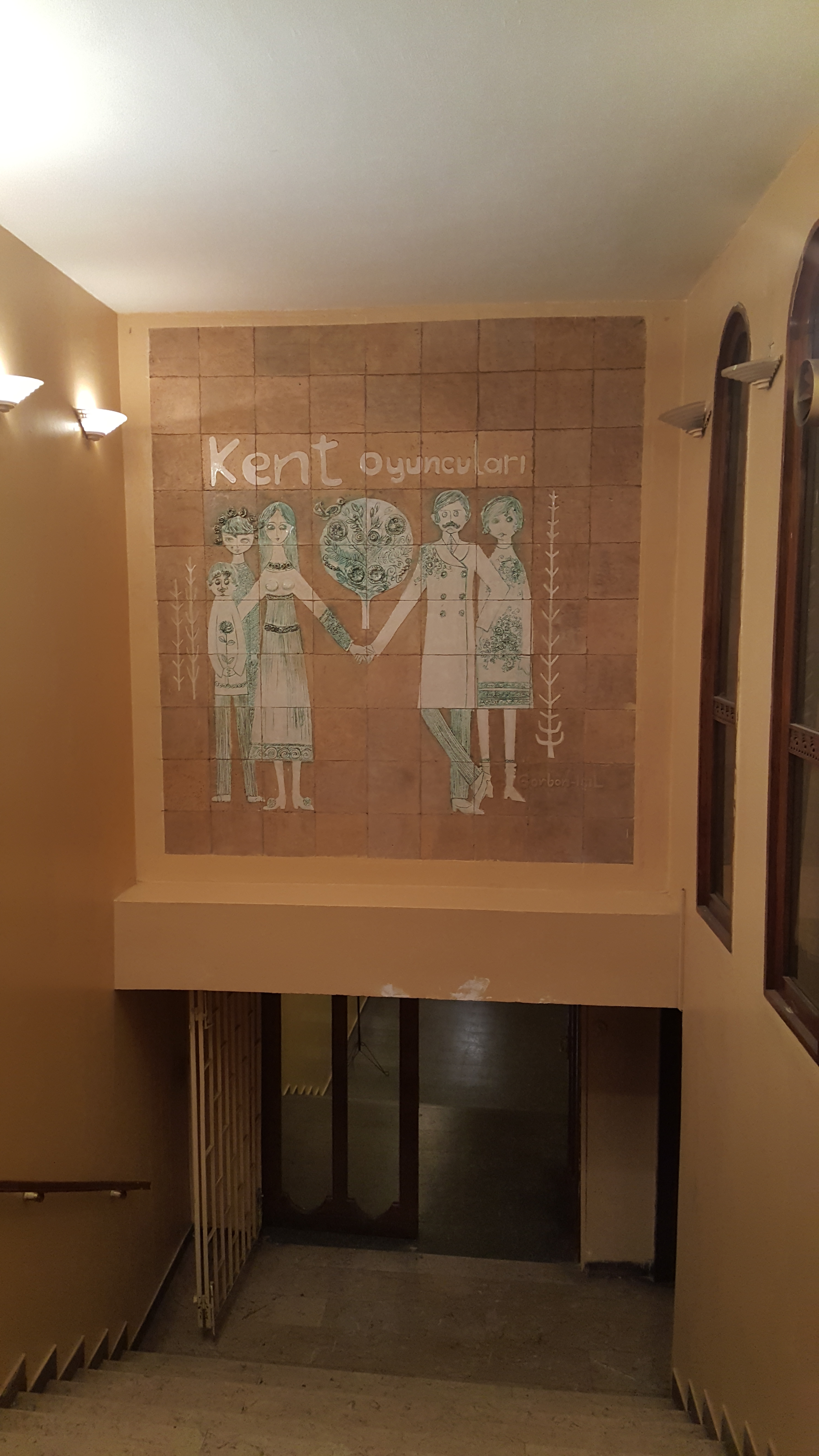 Kenter Tiyatrosu girişindeki pano.